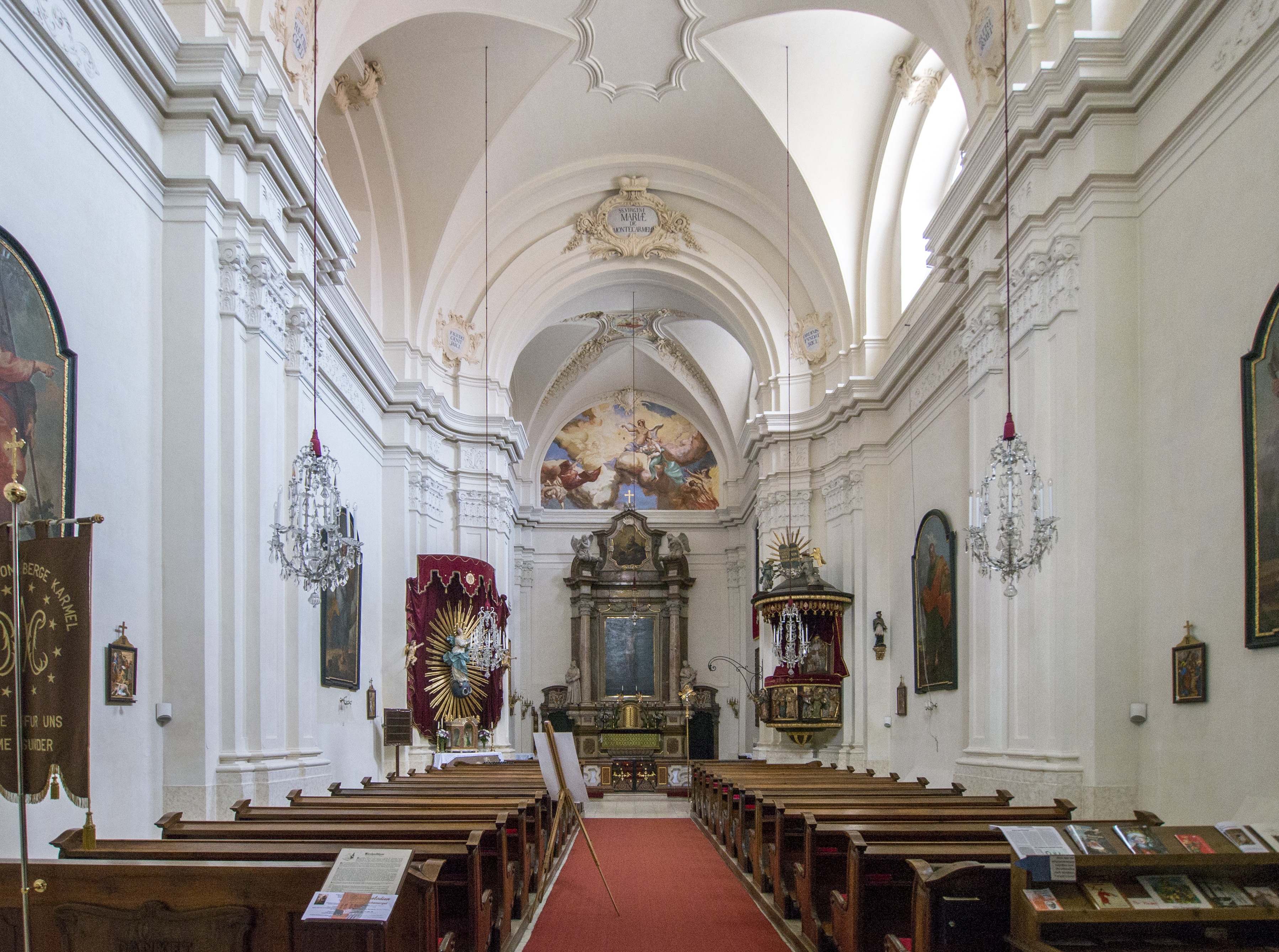 Prandtauerkirche zur Maria vom Berge Karmel